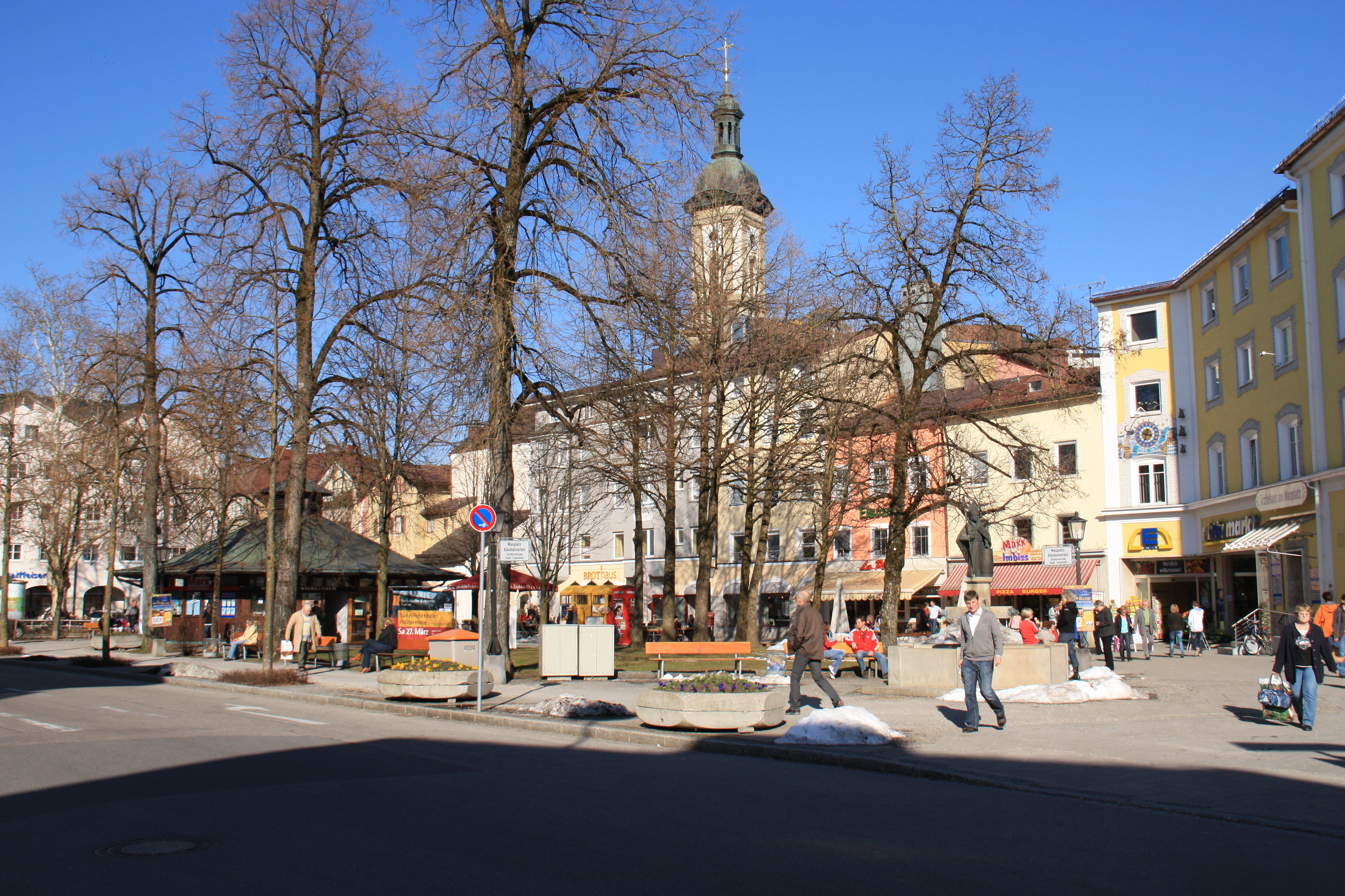 Der Maxplatz in Traunstein (Südansicht)